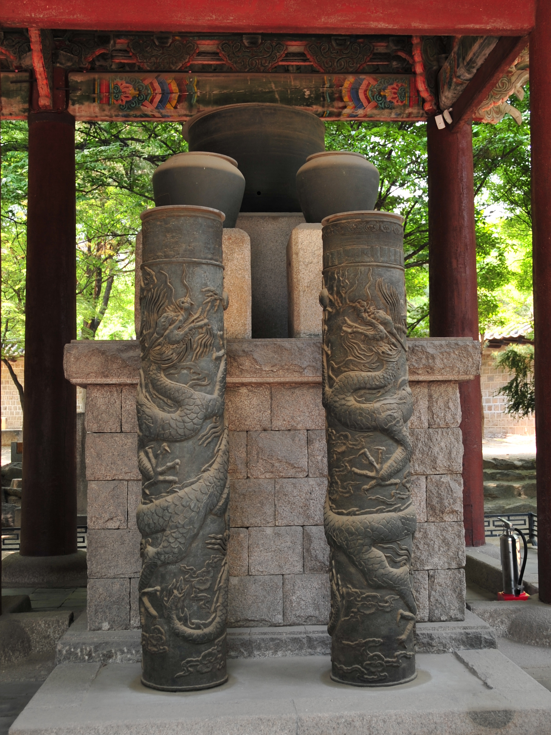 Own work 광명문 내에 전시된 보루각 자격루